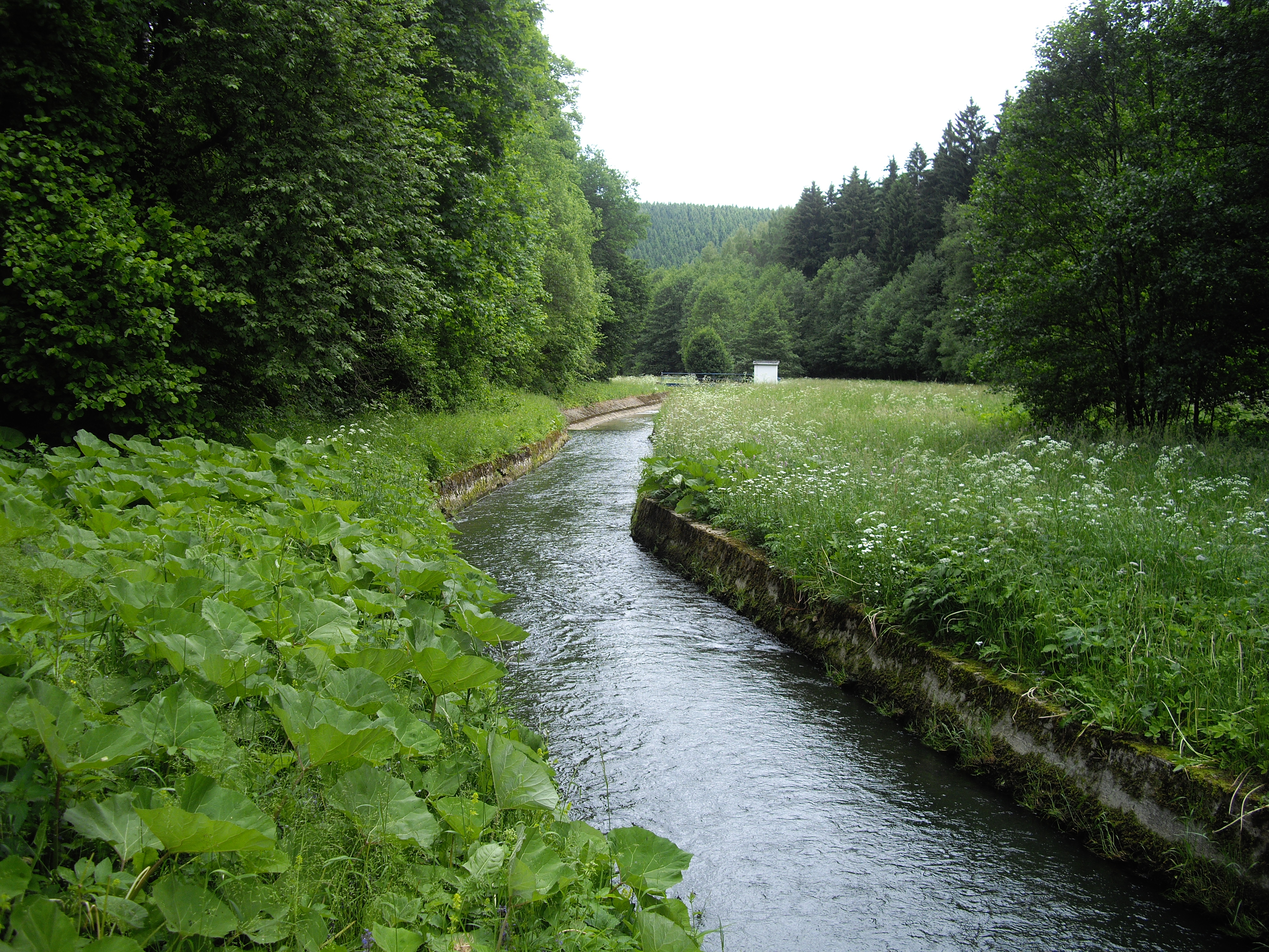 Die Wippper kurz nach der Talsperre Wippra